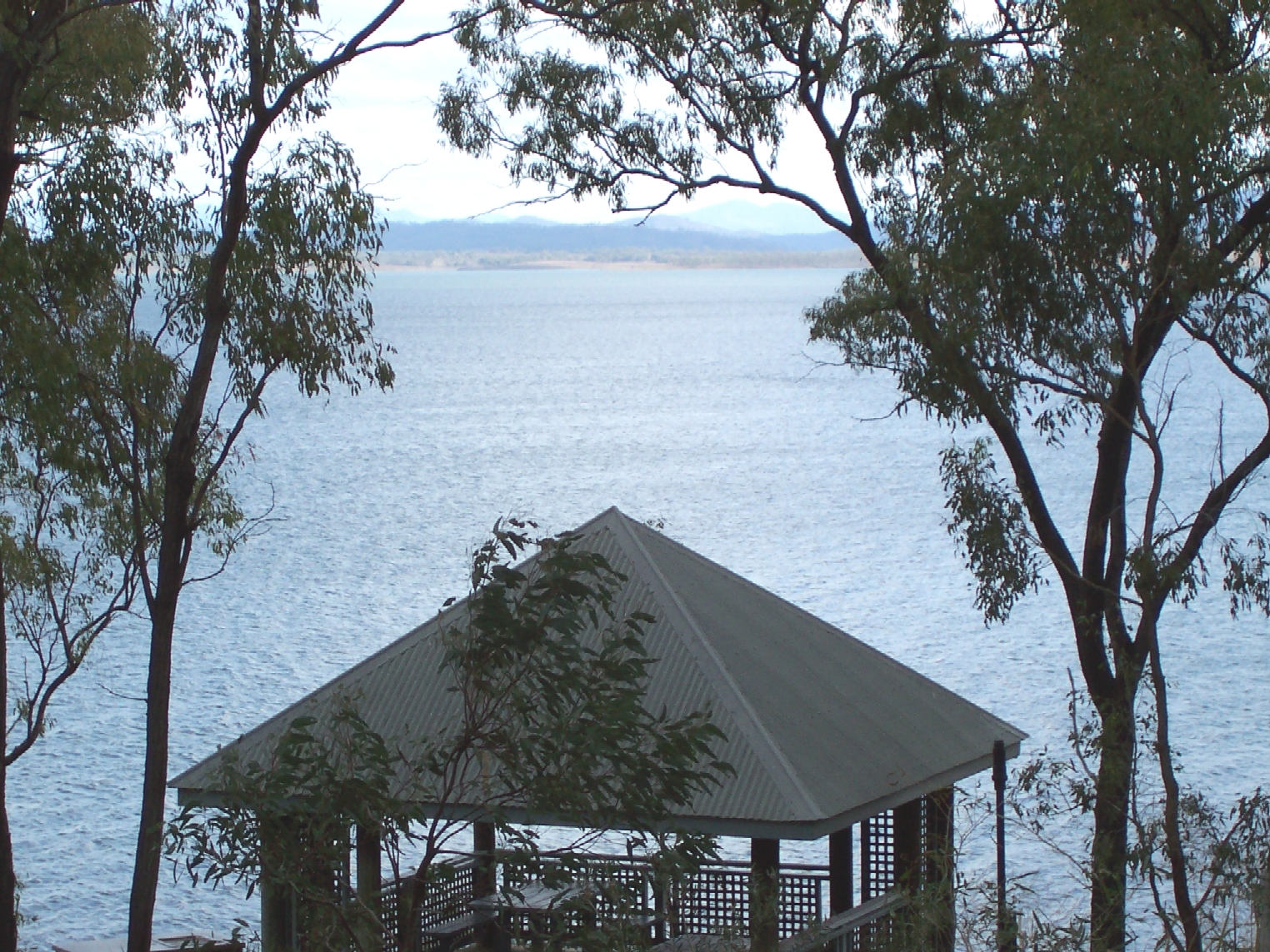 Hut Overlooking Lake Awoonga in Central Queensland